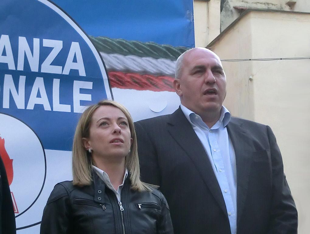 Meloni e Crosetto a Sanremo per la campagna elettorale per le Elezioni europee del 2014 e comunali